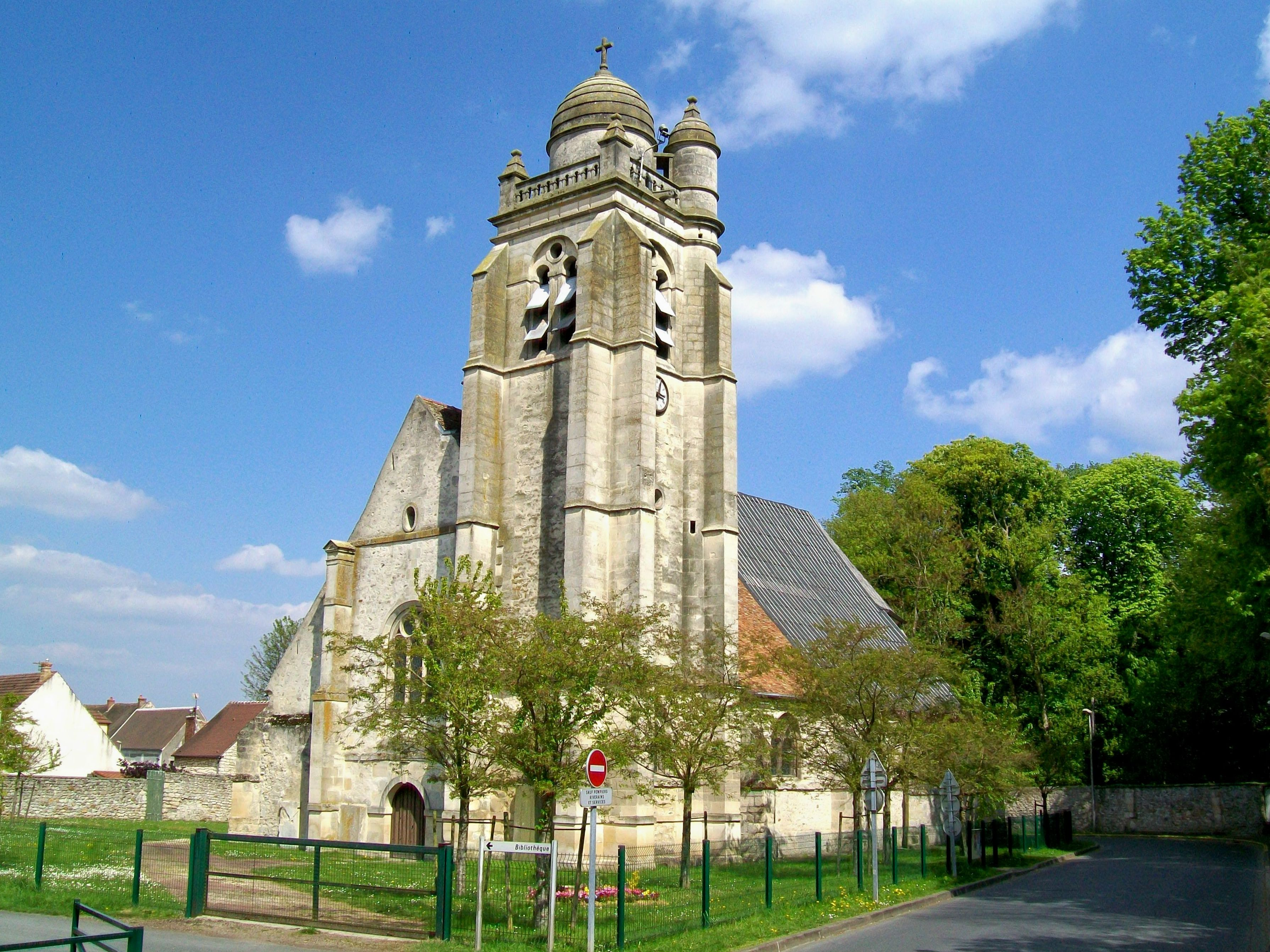 L'église Sainte-Trinité de La Chapelle-en-Serval, inscrit Monuments historiques depuis 1949.